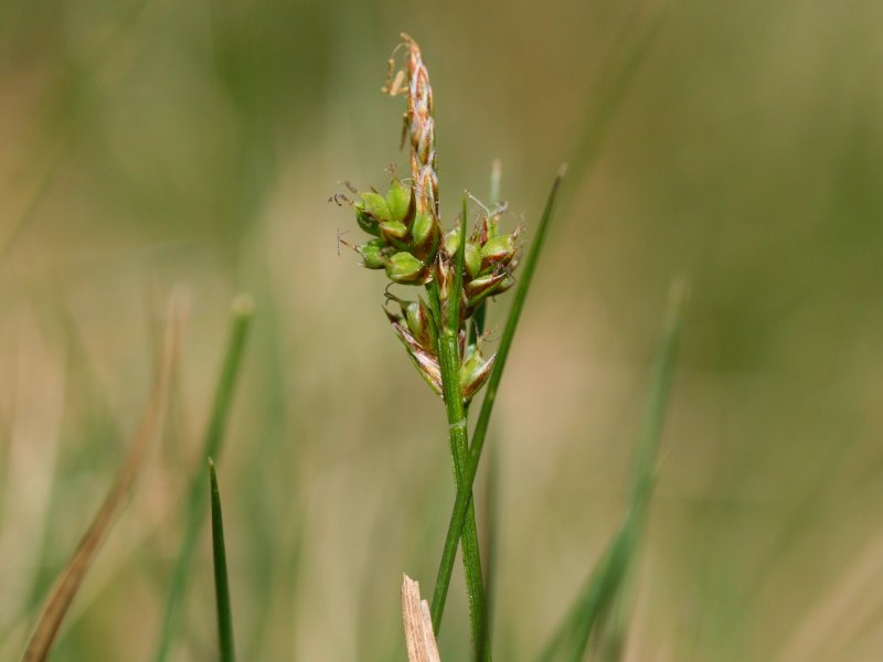 Pillen-Segge (Carex pilulifera)